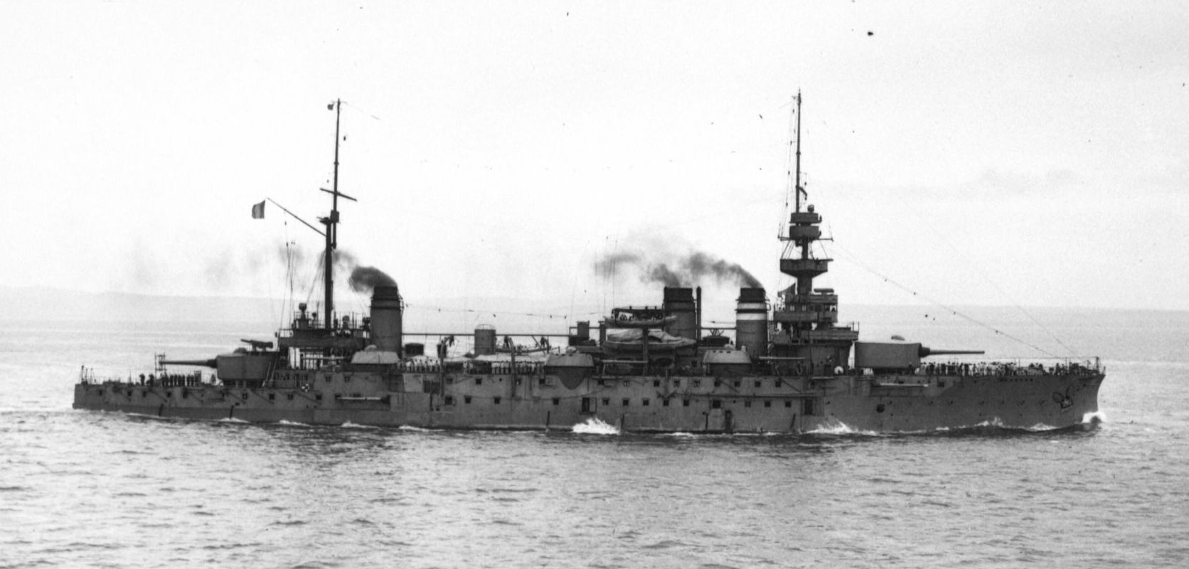 Cuirassé Justice